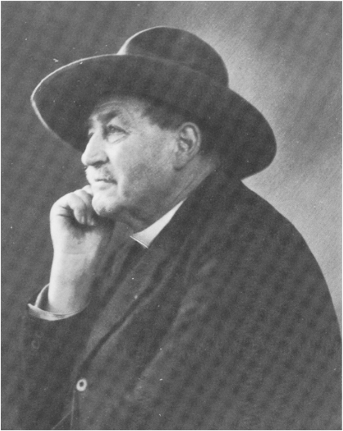 portrait